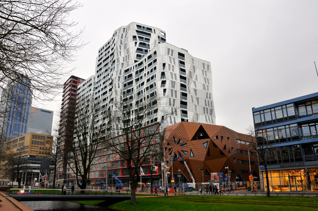 Dit eind 2012 opgeleverde woon- en kantorencomplex -ontworpen door SMC Alsop Architects- staat op de plek van het Holiday Inn, de Pauluskerk en de bioscoop Calypso. Rechts naast De Calypso staat de nieuwe Pauluskerk.